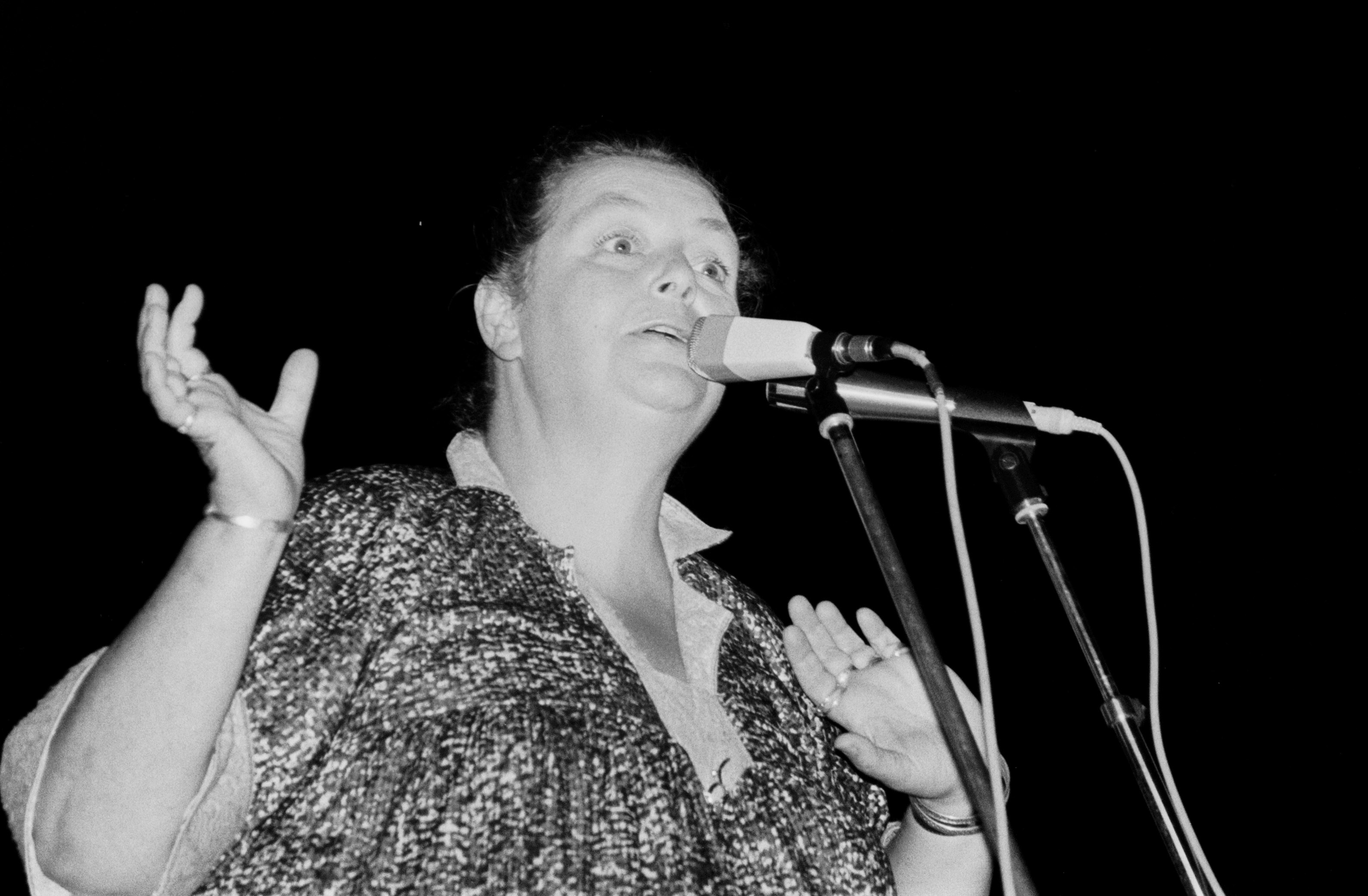 La chanteuse cornouaillaise Brenda Wootton en concert à Quimperlé (Bretagne, France) en 1980.